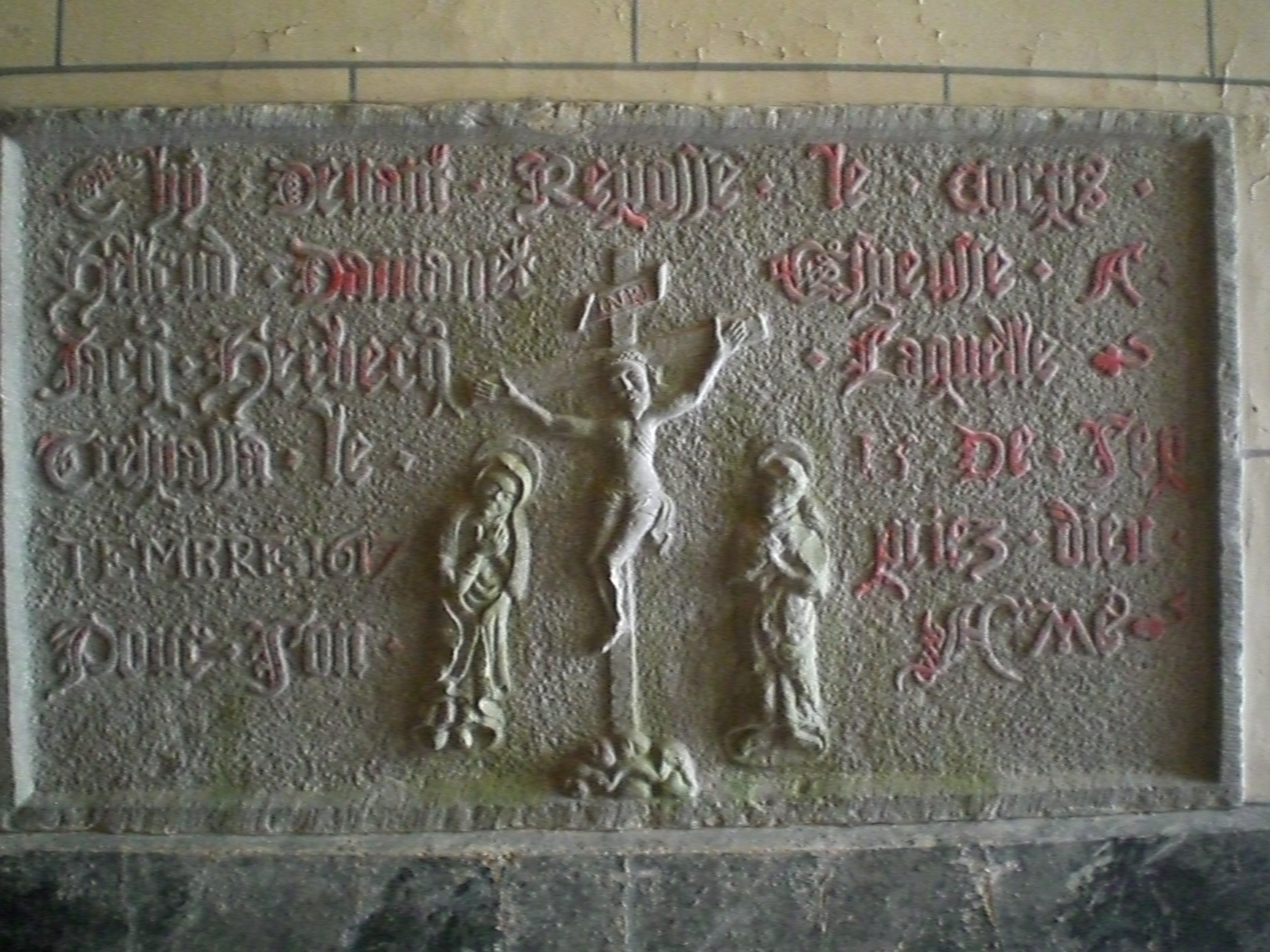 pierre tombale d'Hiltrud_Herbecq à l'eglise de ramousies mort en 1617